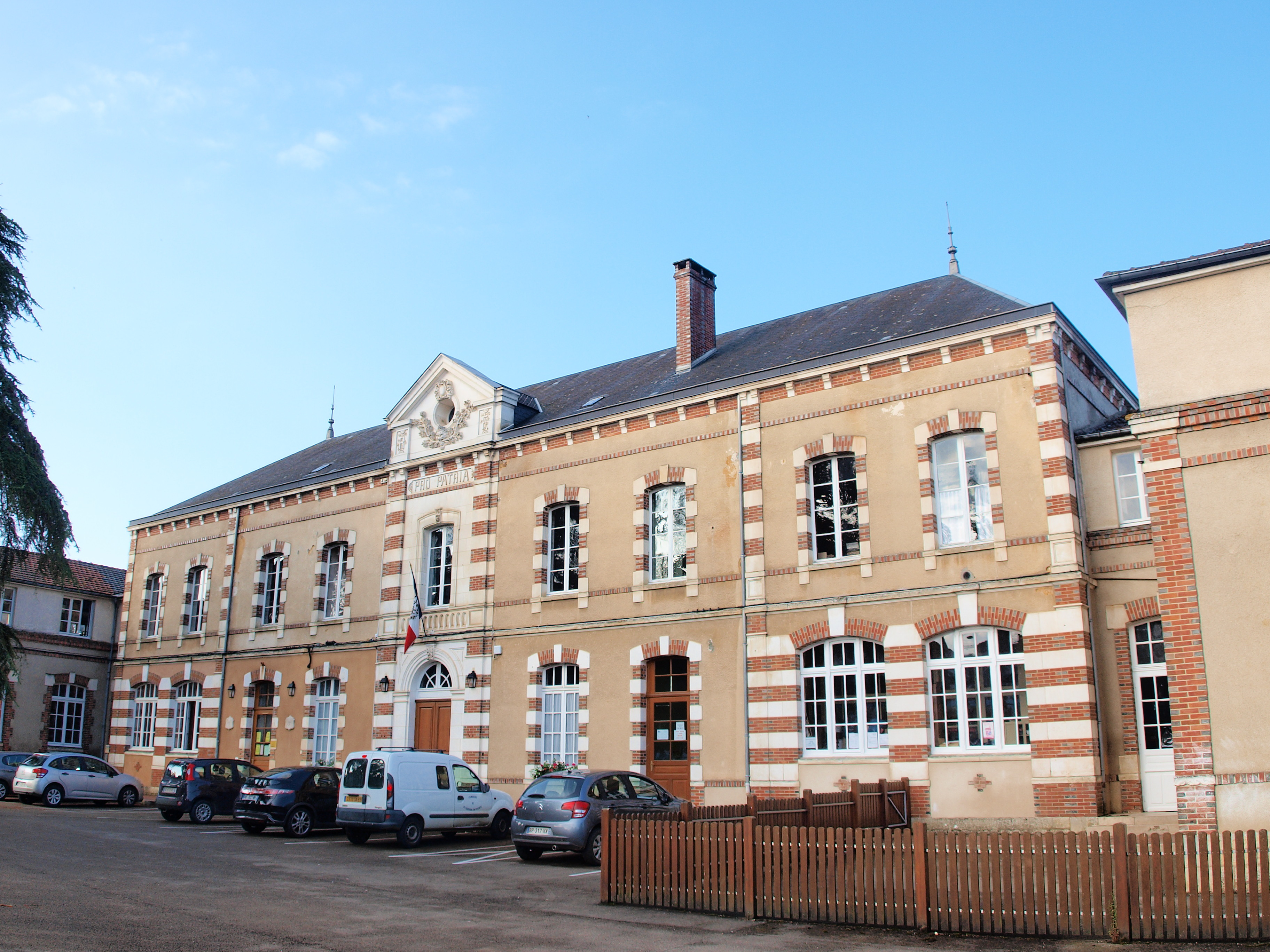 Saint-Sauveur-en-Puisaye (Yonne, France) ; la mairie.